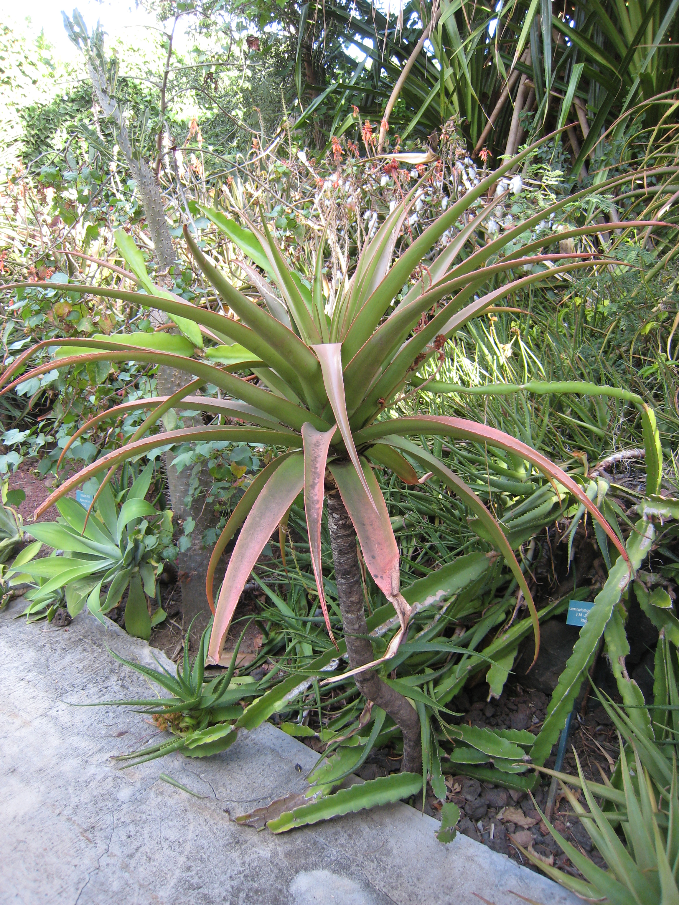 Lomatophyllum purpureum au Jardin d'Éden de Saint-Paul, sur l'île de La Réunion.